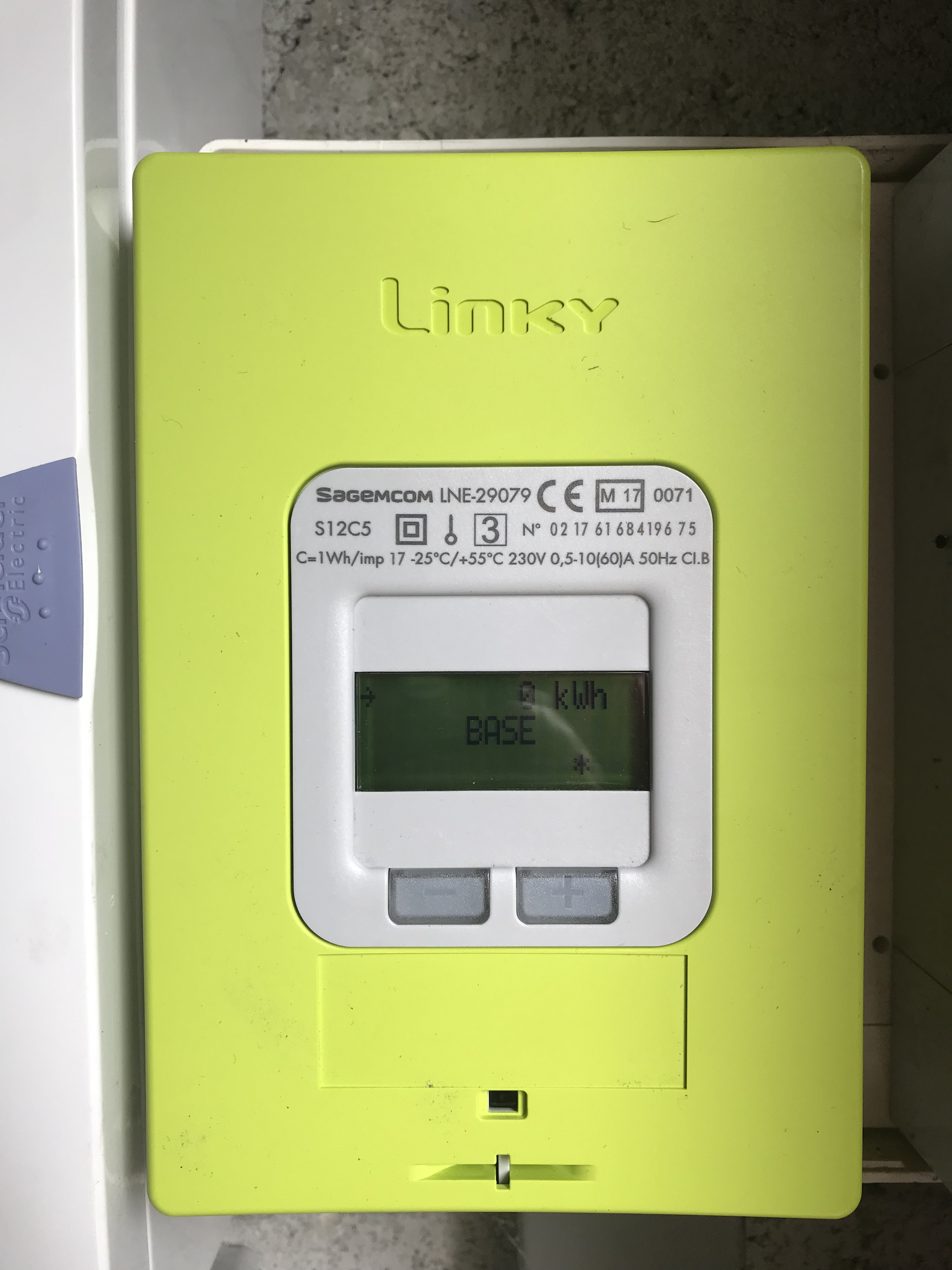 Compteur Linky tout juste installé (France) : il affiche logiquement 0 kW/h consommé.